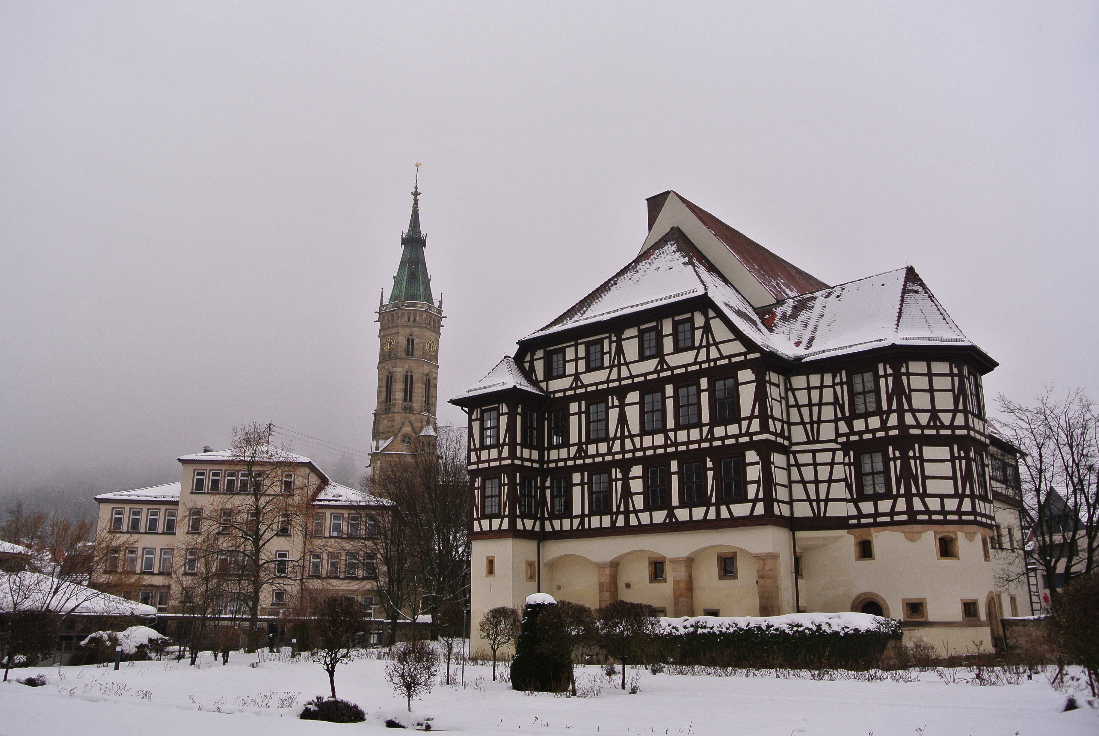 Bad Urach: Schule, Kirche und Schloss